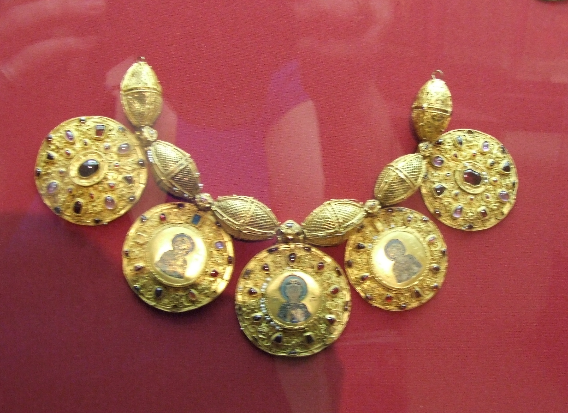 БАРМЫ XII – начало XIII века Сольвычегодск (?) Золото, драгоценные камни, жемчуг; чеканка, скань, зернь, эмаль Диаметр медальонов – от 7,3 до 8; длина бусин – 4,2–4,5 Поступили в 1831 году Происходят из клада, найденного в 1822 году на месте Старой Рязани ММК инв. МР-971, МР-972, МР-973, МР-978, МР-979, МР-988–993